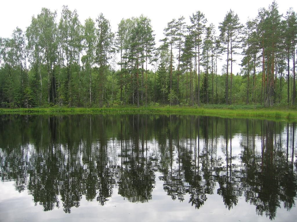 Linnajärv